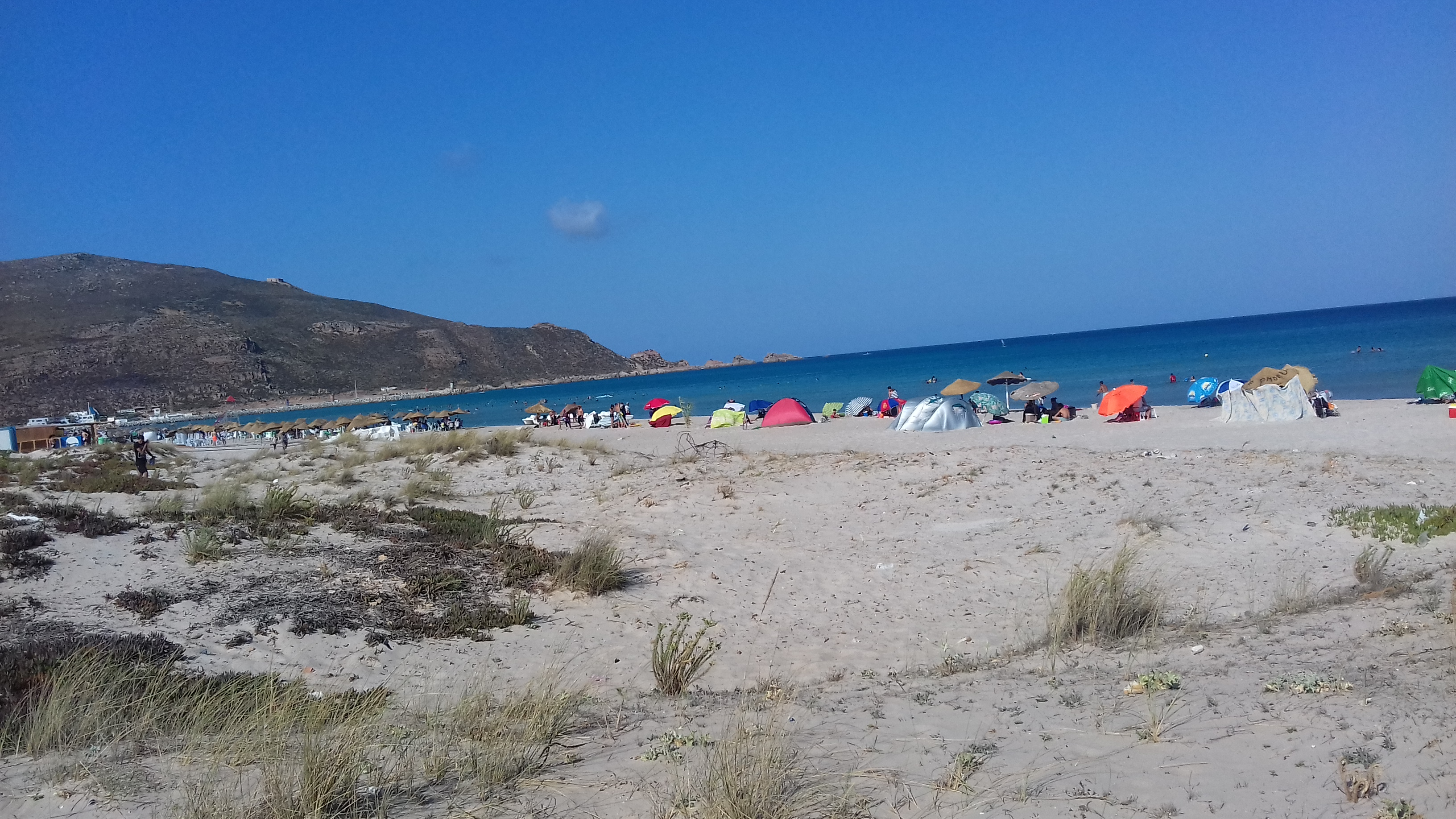 Beach El Haouaria